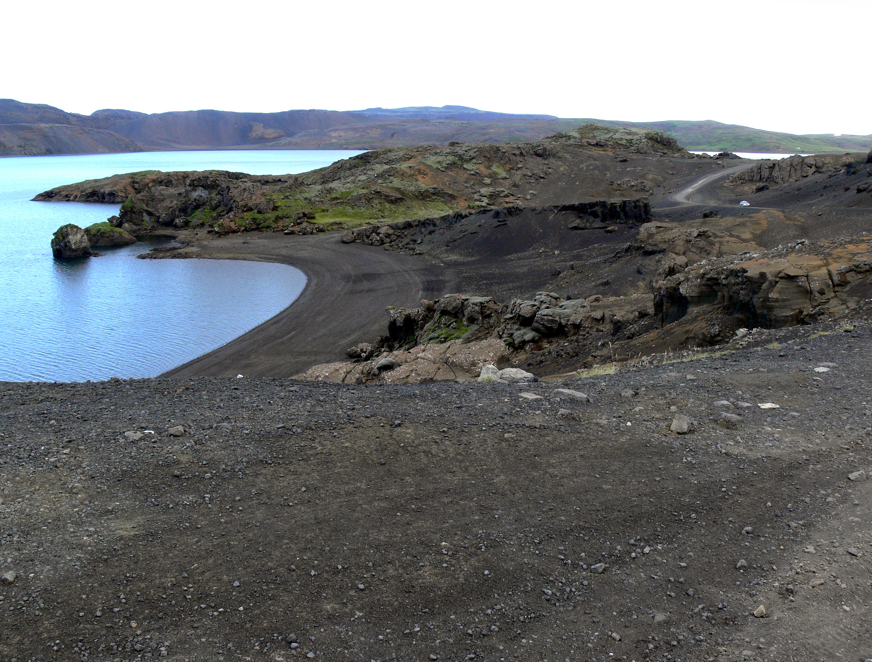 Kleifarvatn